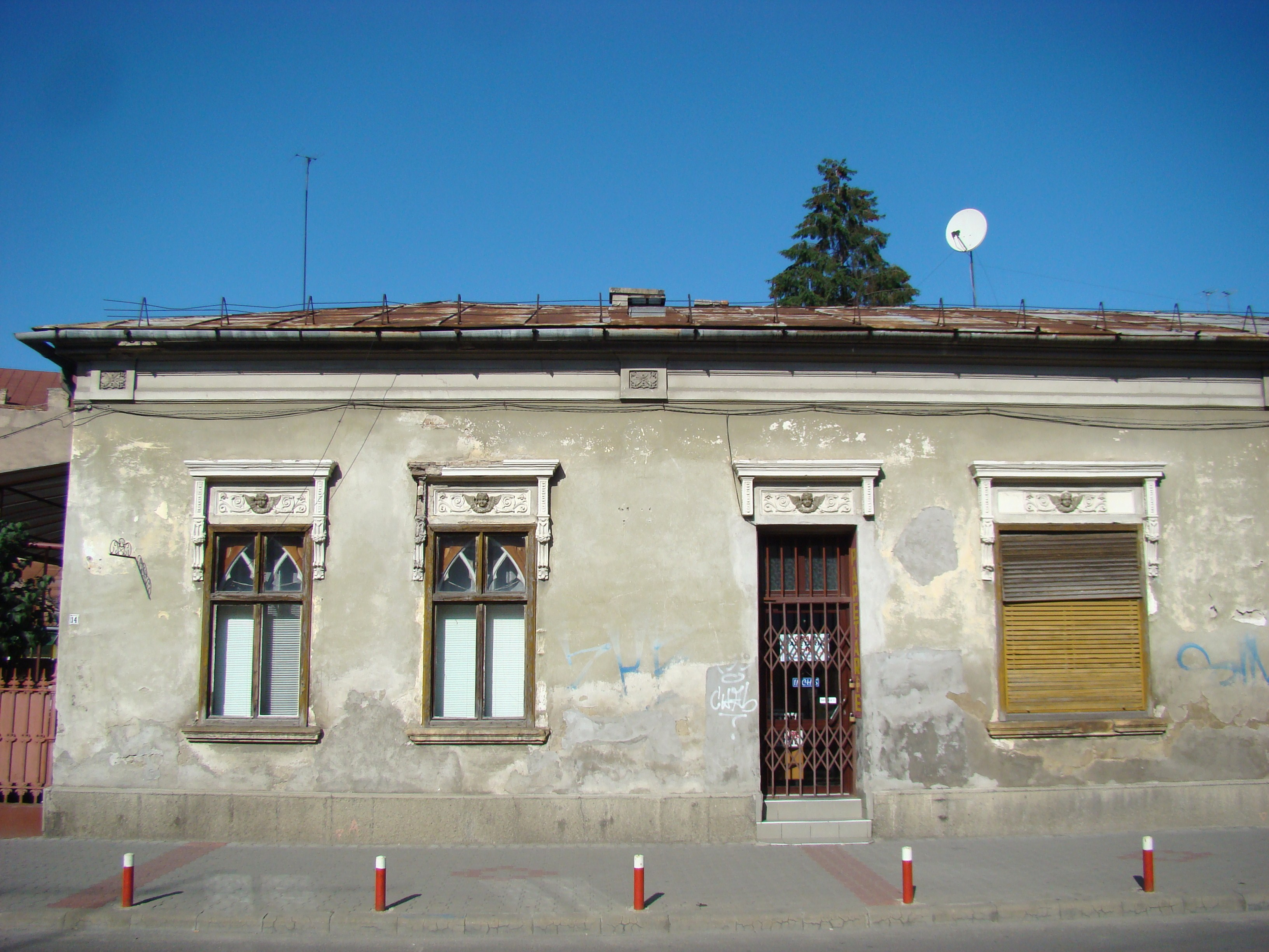 Clădire monument istoric, tsr.Emil Isac, nr.14